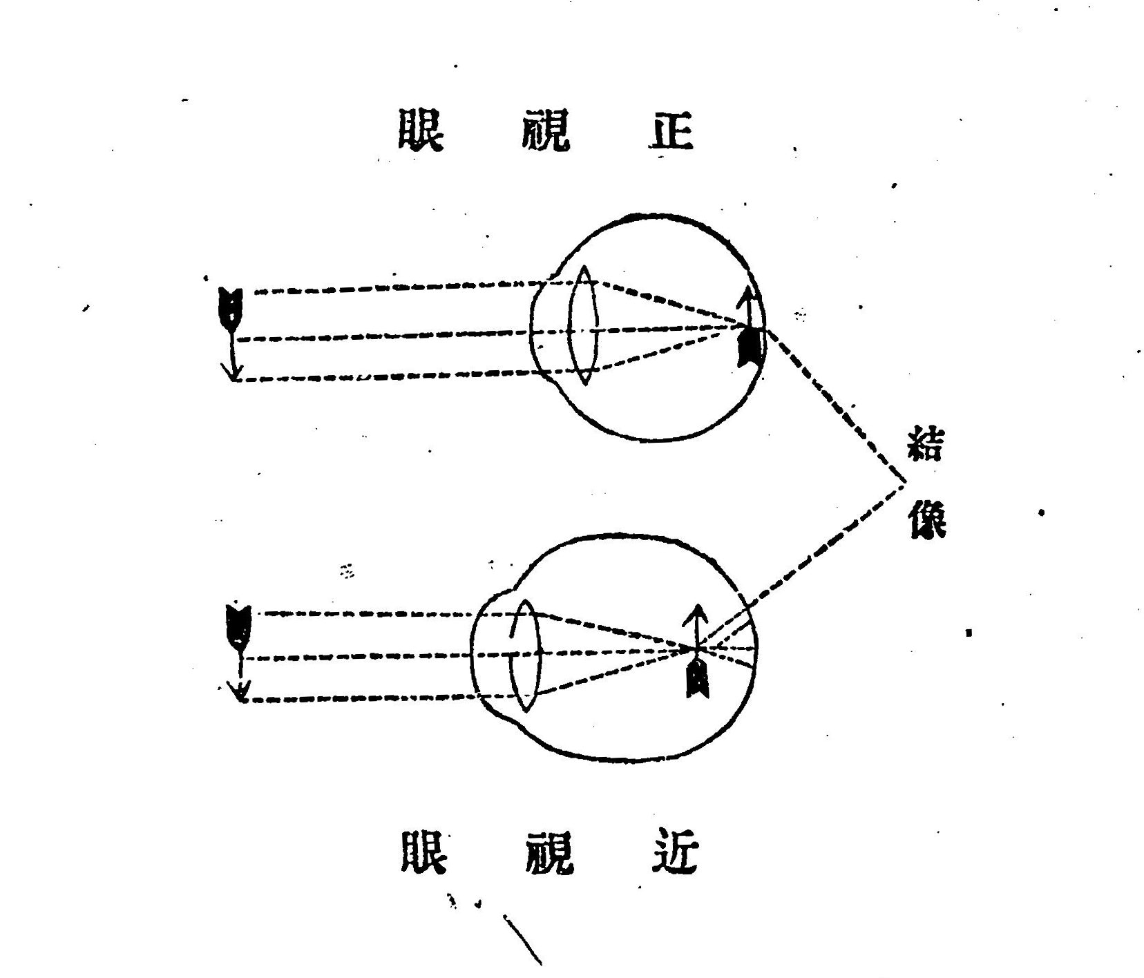 丸尾瞭益閲、美甘光太郞述『學校近視談』復明館、1897年。